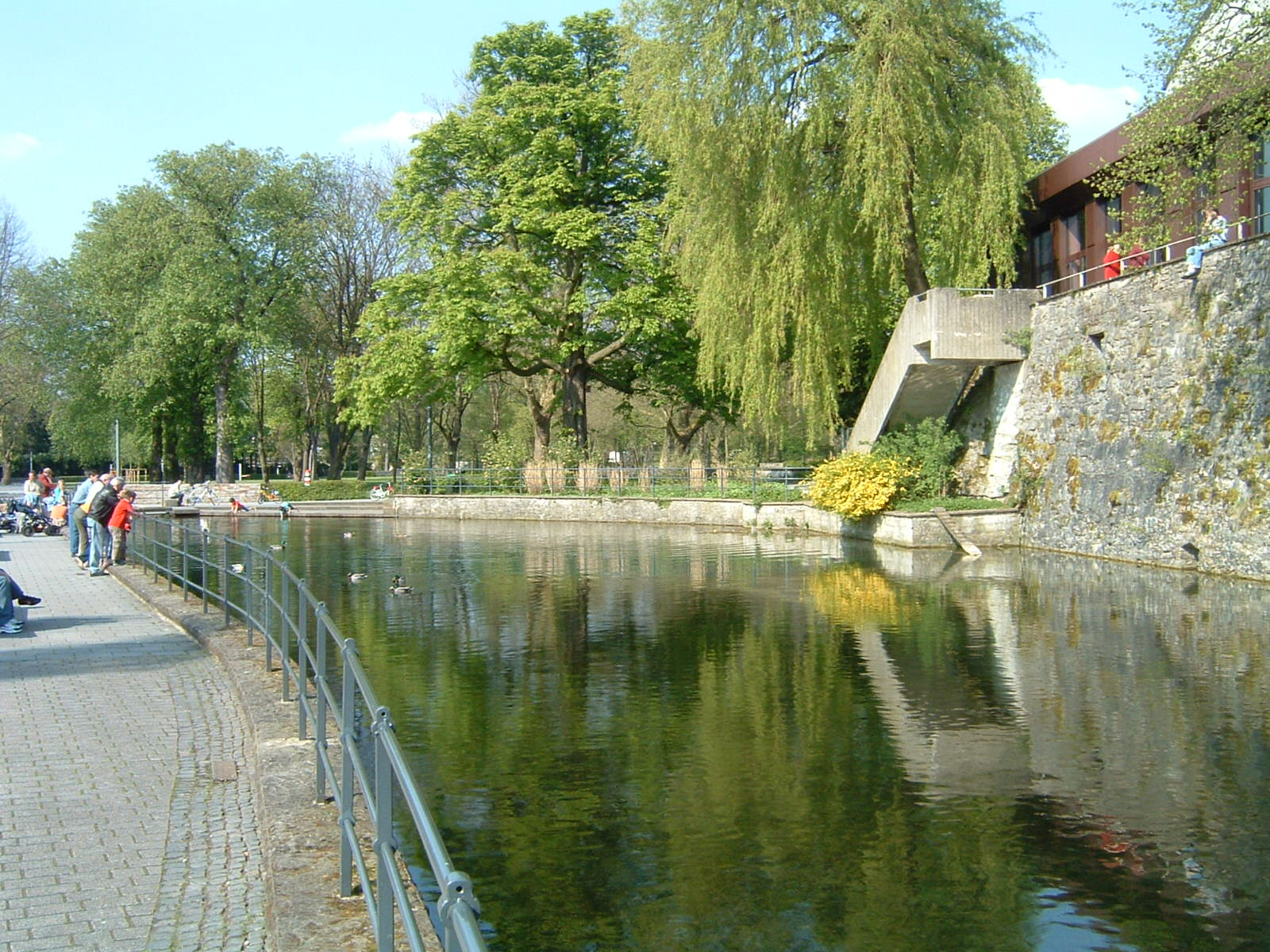 Die Lippequelle am Fuß der Burg in Bad Lippspringe